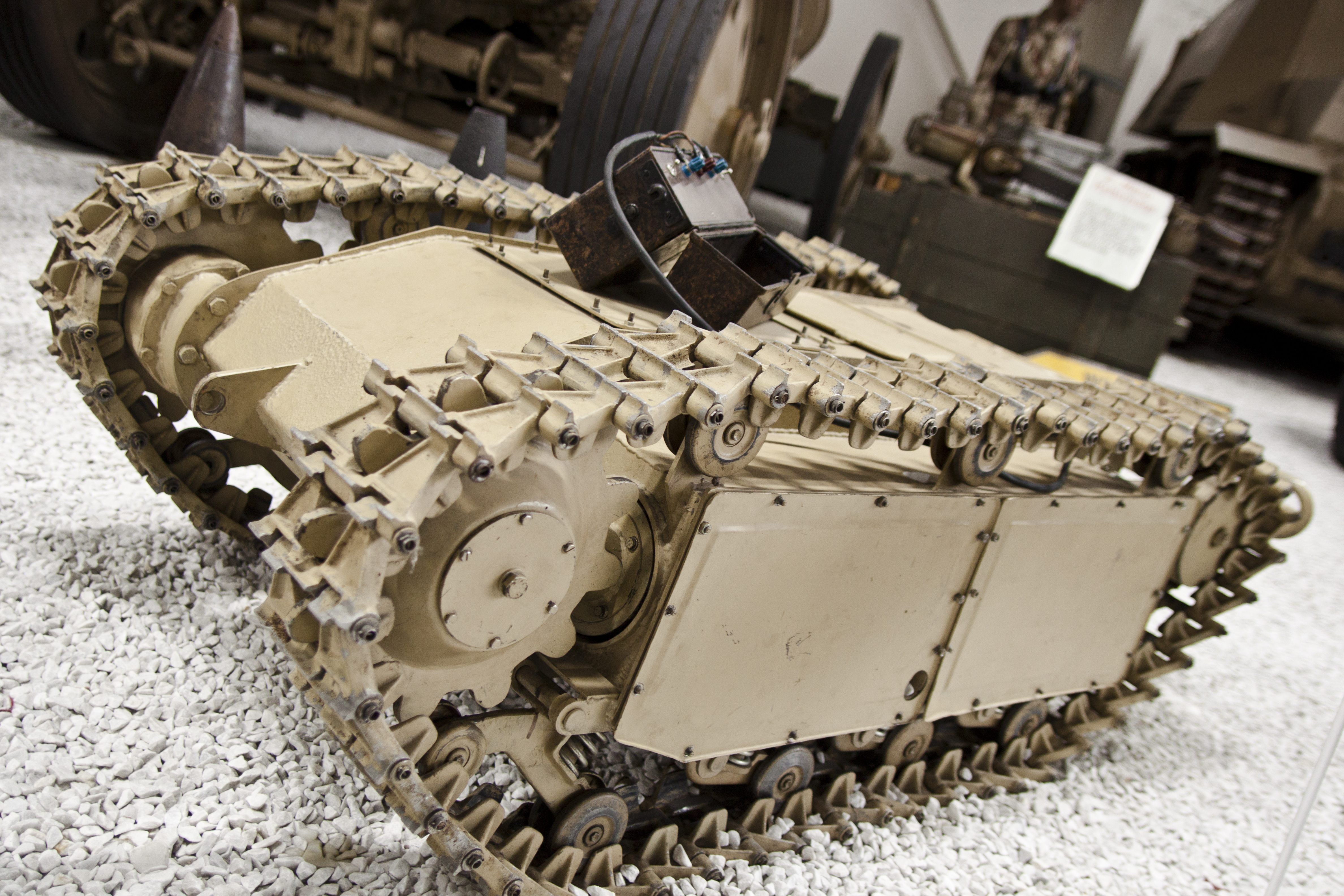 Goliath Sprengpanzer, Version aus dem Technikmuseum Sinsheim.